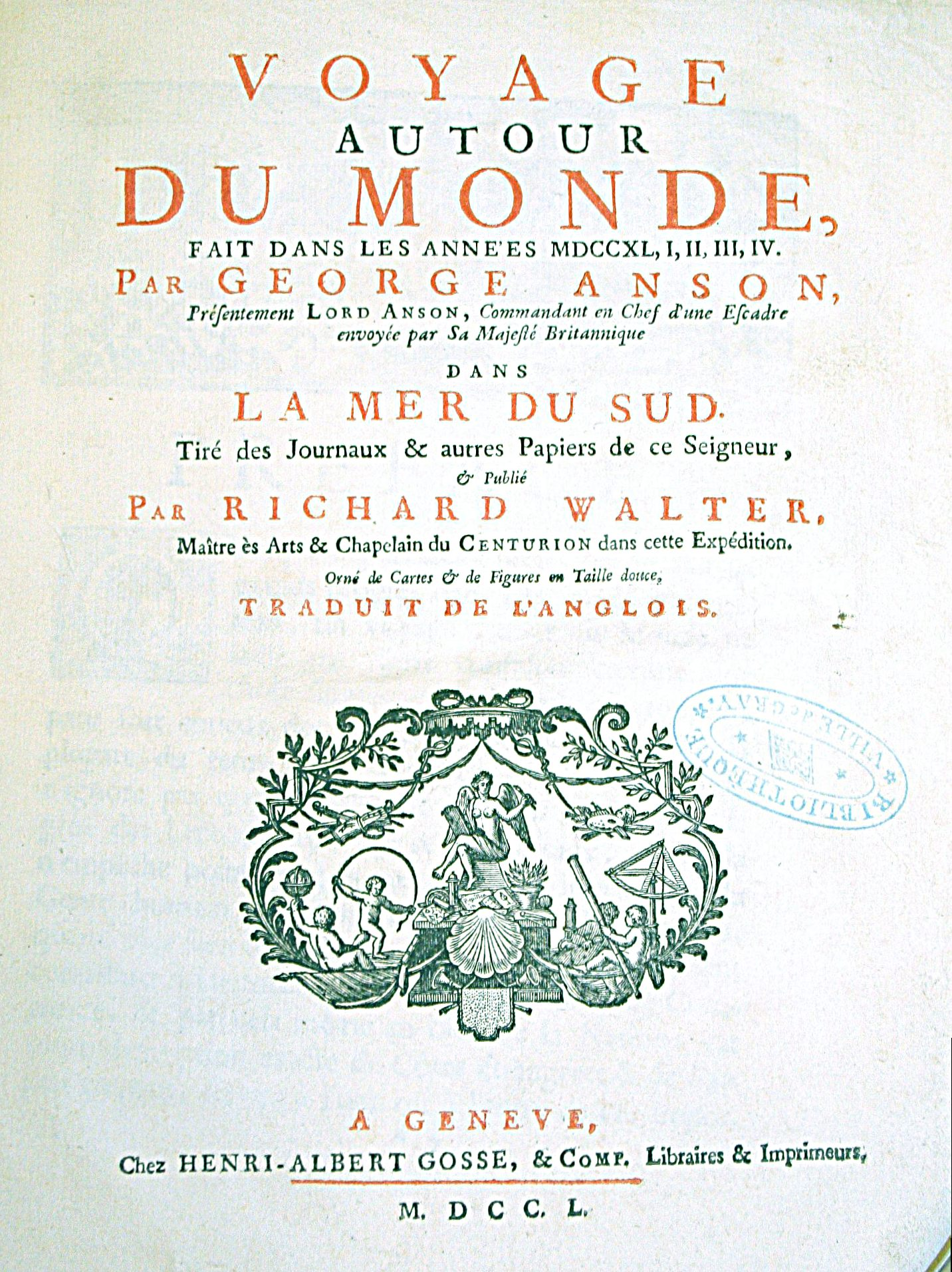 [Illustrations de Voyage autour du monde] Auteur : George Anson Éditeur : Henri-Albert Gosse et Compagnie (Genève) 1750 Bibliothèque patrimoniale de Gray